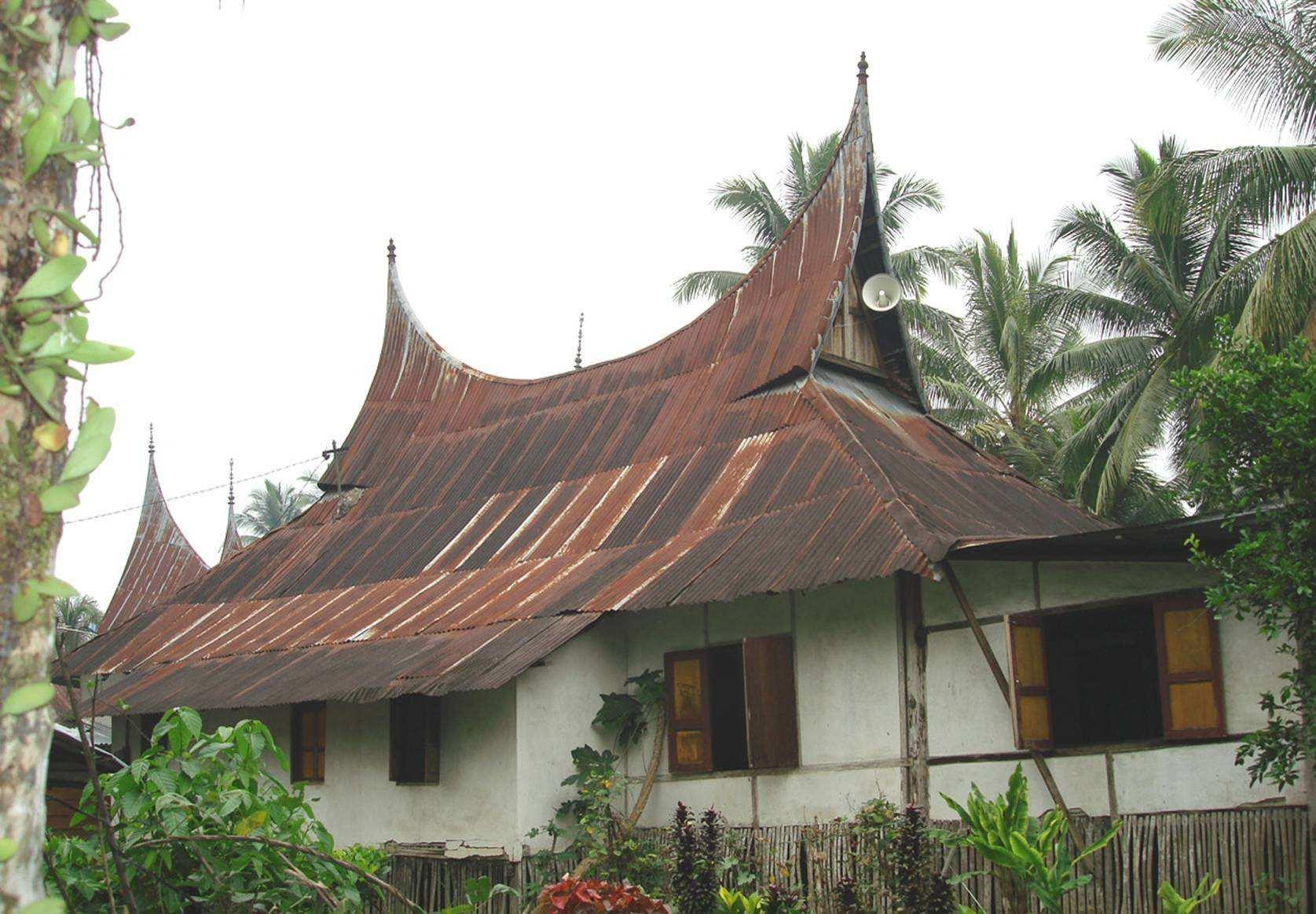 Cagar budaya Surau Latiah